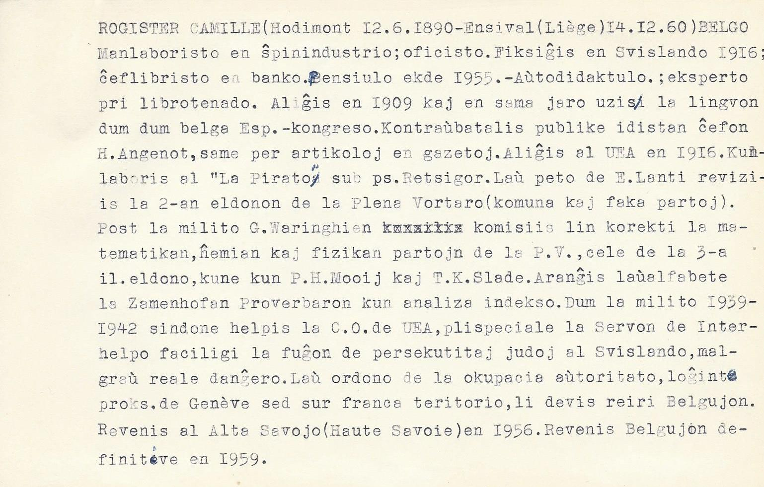 Slipo el la FelixArchief (2233-267) en Antverpeno : Camille Rogister